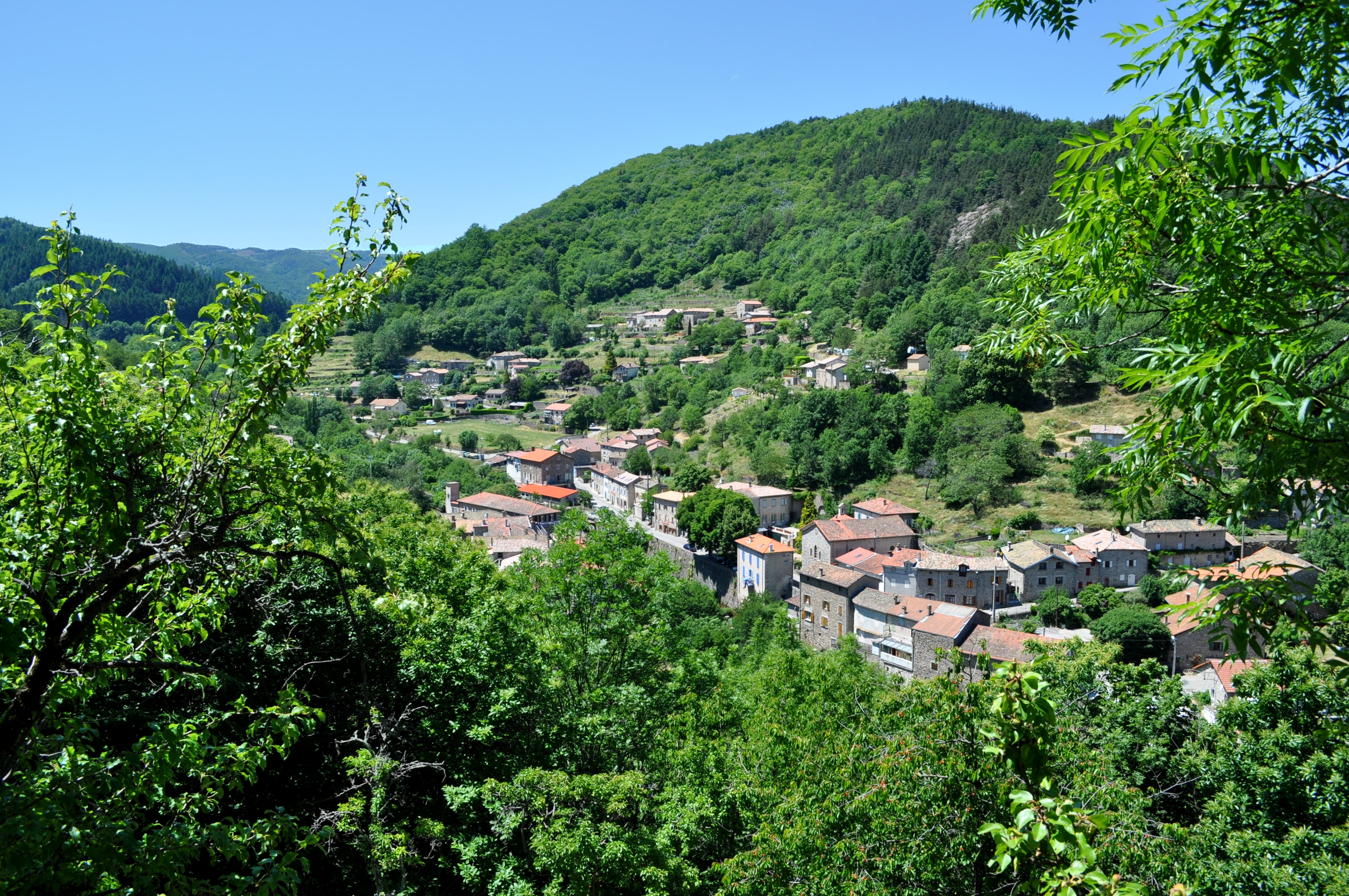 Vue générale du village d'Albon depuis le Sud du village avec le Rocher de Bon Temps qui domine le village (Ardèche)